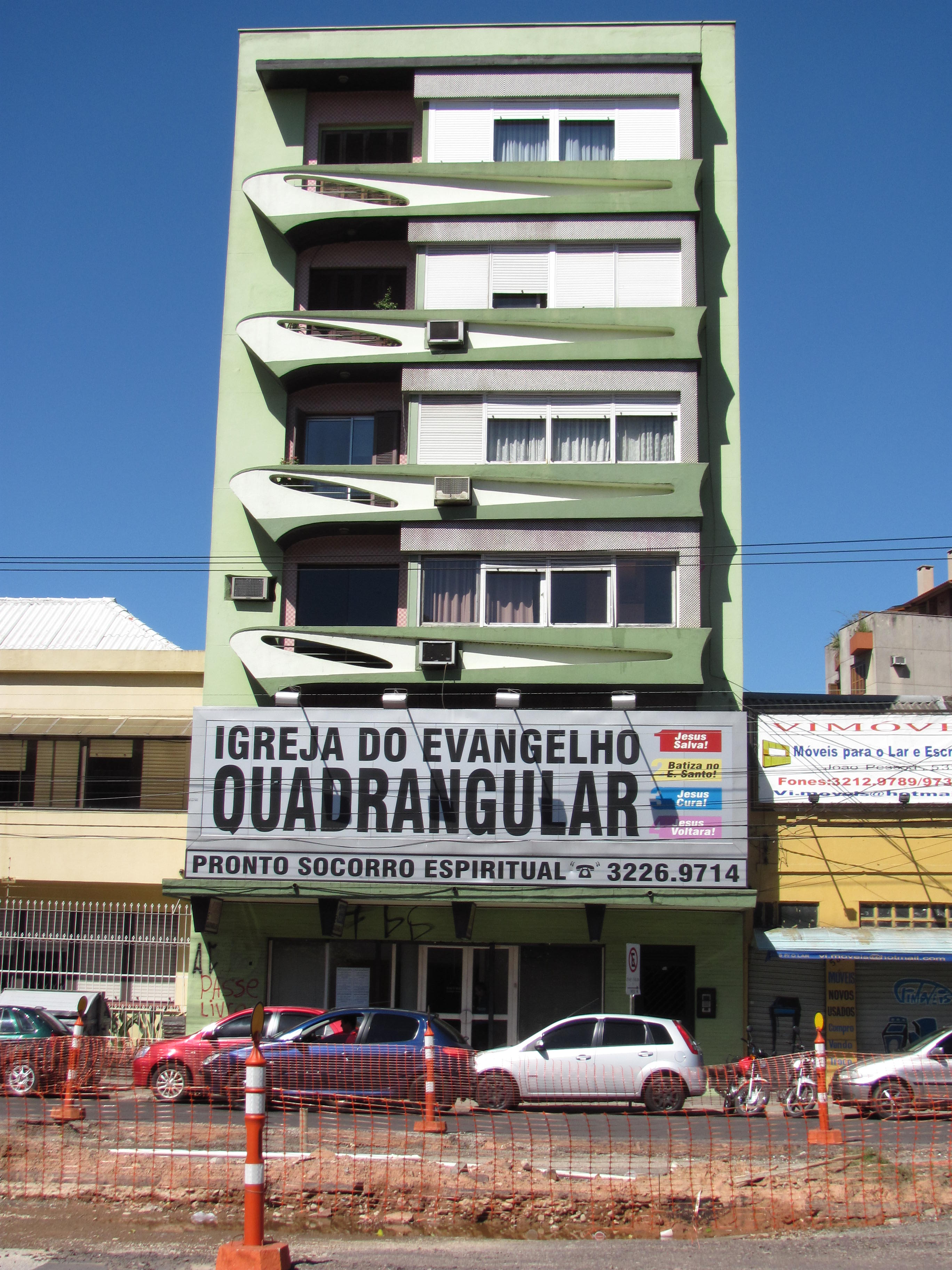 Igreja do Evangélio Quadrangular, Porto Alegre